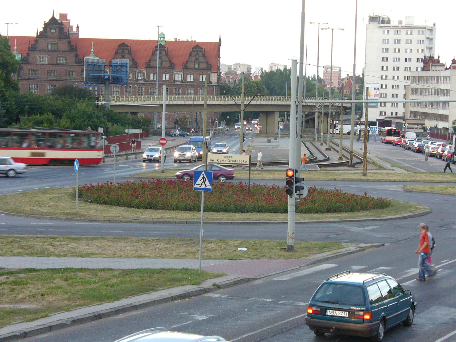 Węzeł Carla Groddecka, Alei Armii Krajowej, ul. 3 Maja i ul. Biskupiej, Gdańsk Gdańsk, Carl Groddeck junction, the intersection of Aleja Armii Krajowej, ul. 3 Maja and ul. Biskupia